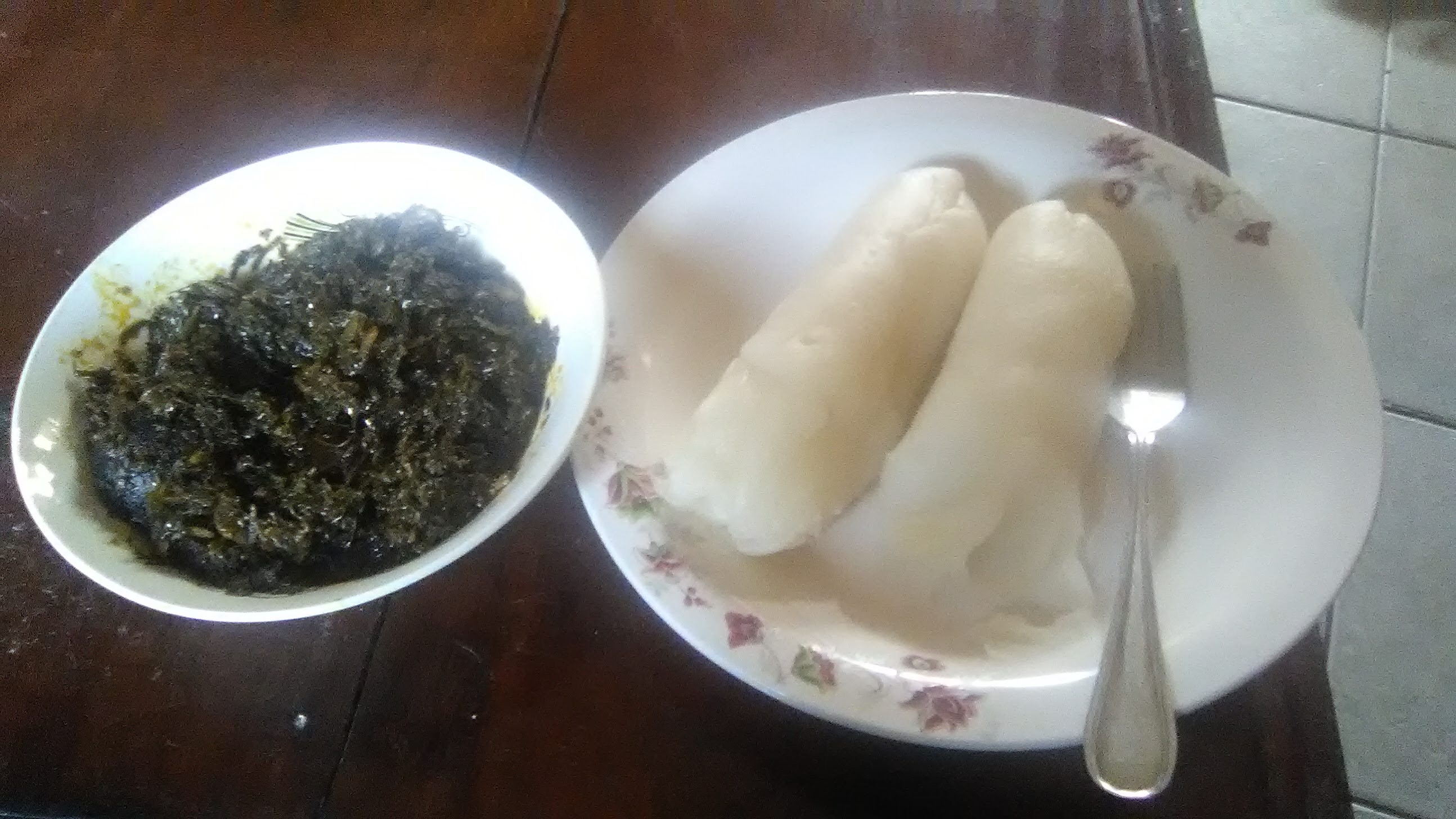 Le water fufu est un mets fait à base de manioc trempé dans de l'eau pendant trois à cinq jours. Il est typique et de tradition dans les zones anglophones du Cameroun. Il s'accompagne d'un plat de légumes verts appelé eru.